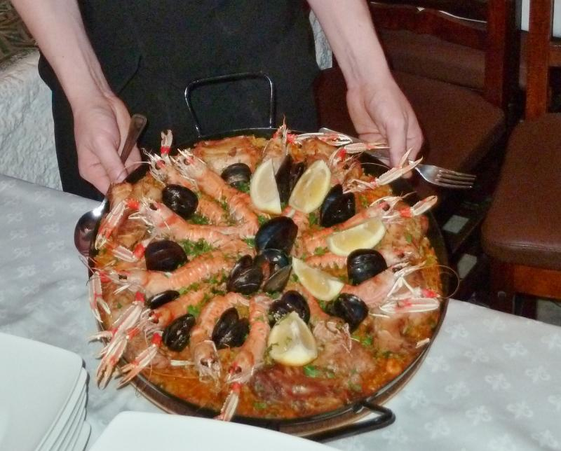 مطبخ جزائري